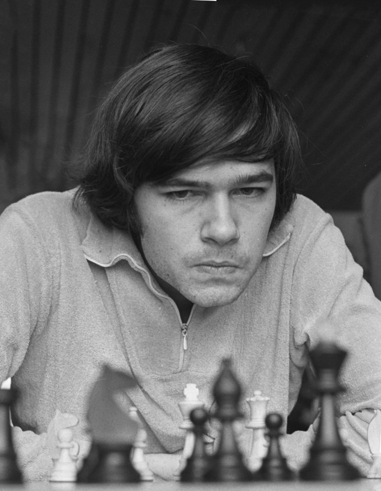 Walter Browne